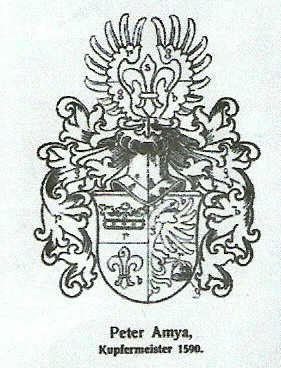 Wappen der Familie Amya, kreiert von Peter Amya, 1590